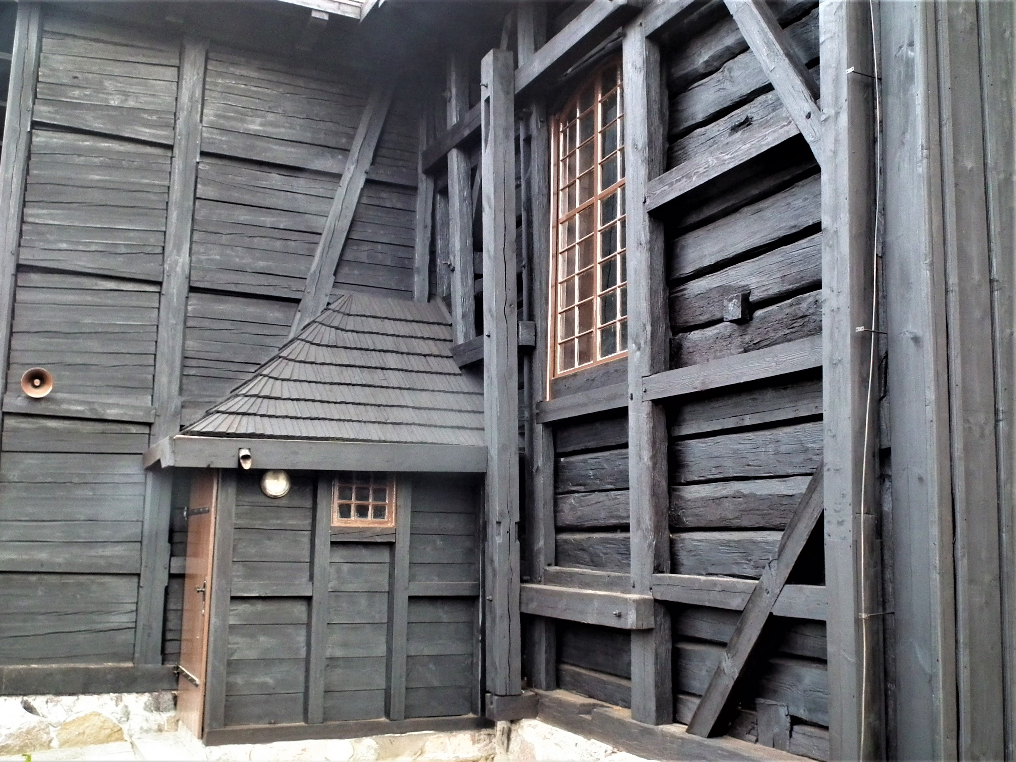 Kościół św. Franciszka z Asyżu w Bronikowie, gm. Śmigiel.